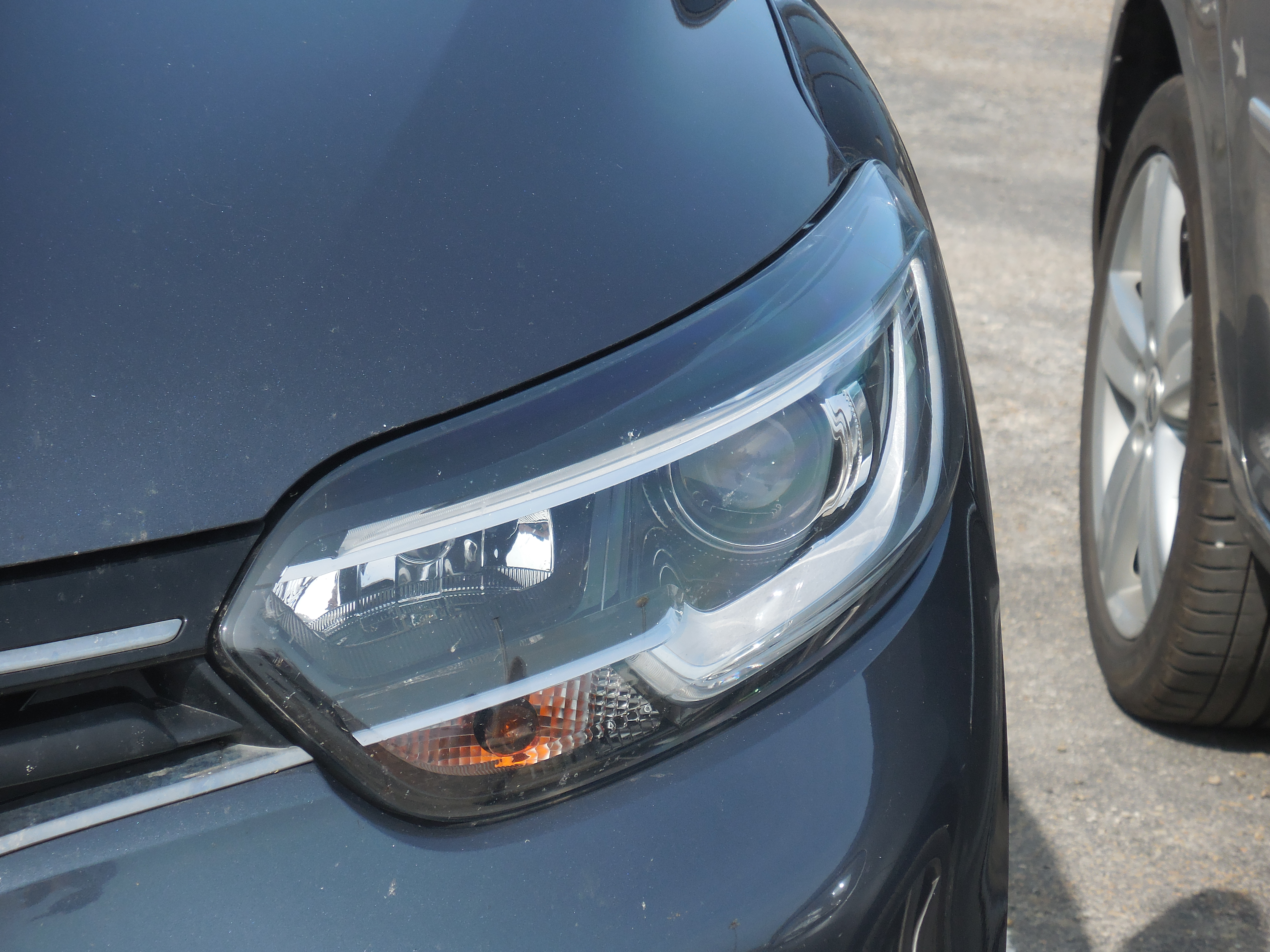 Renault Kadjar - phares halogènes avec signature lumineuse à LED